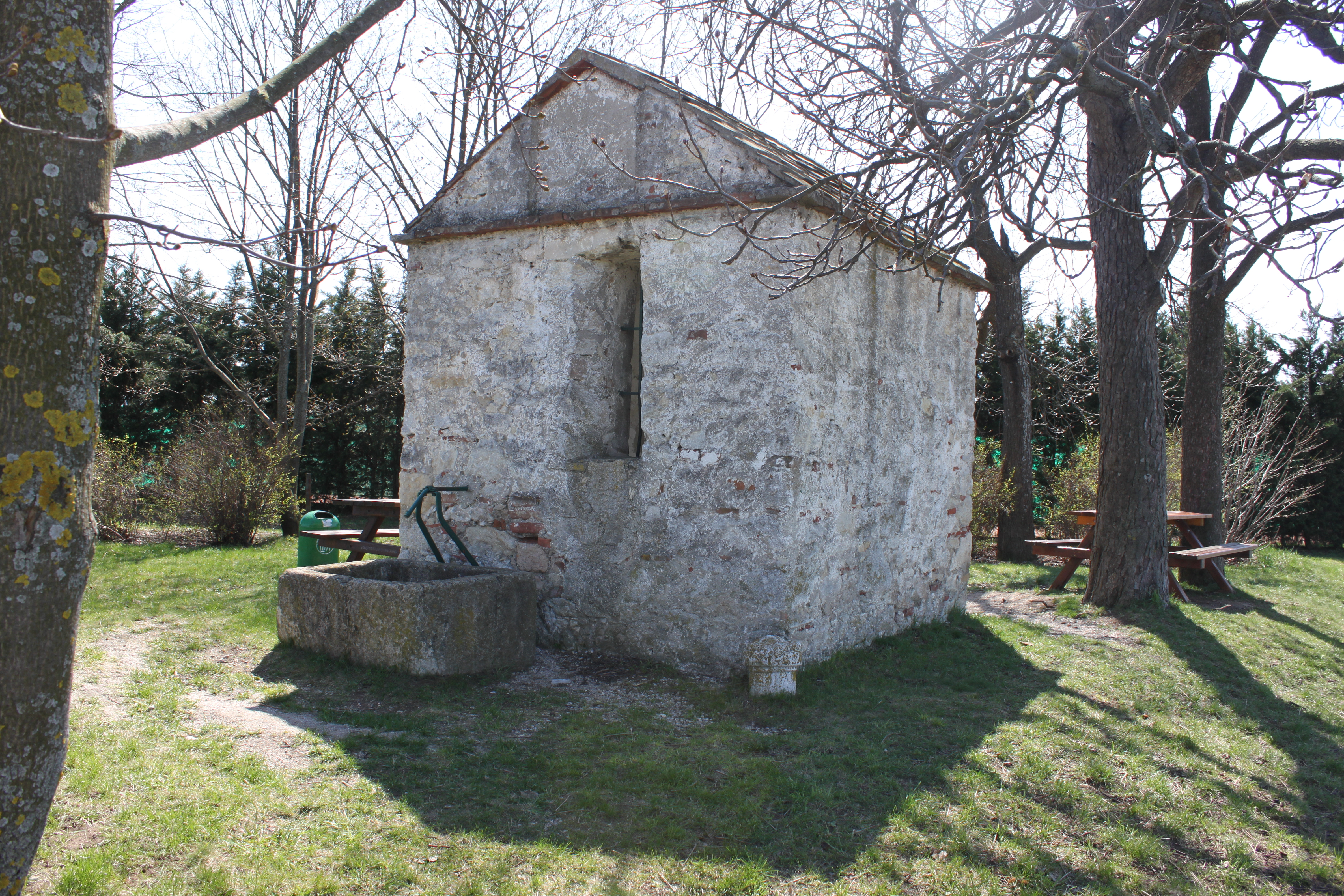 Haidbrunnen, mit Wassertrog davor